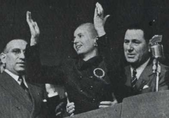 Eva Duarte (Evita). Perón sostiene a Eva mientras pronuncia un discurso en Plaza de Mayo el 1 de Mayo de 1952. A la izquierda el ministro del Interior Ángel Borlenghi.